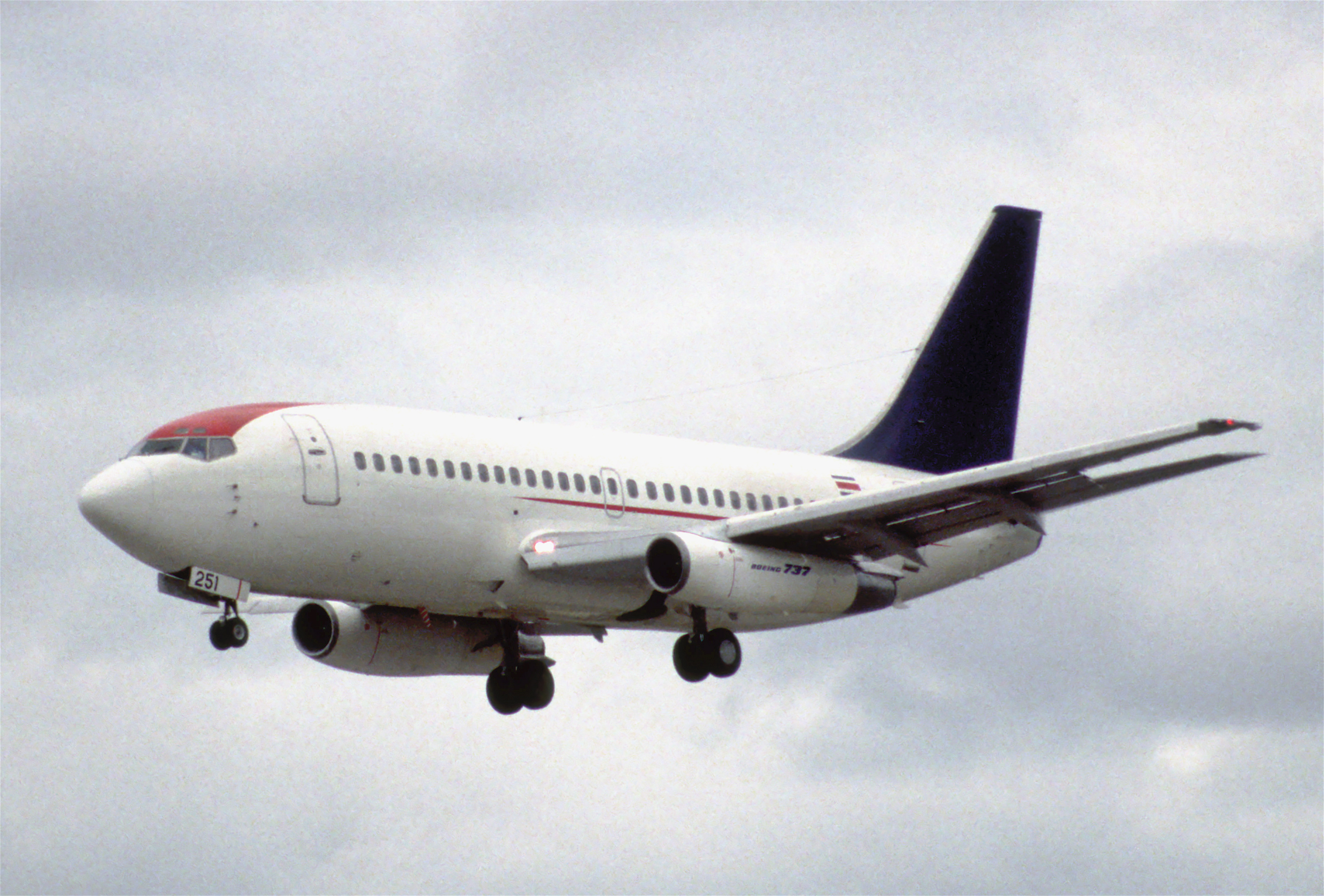 8fv - TACA Boeing 737-2L9; N251LF@MIA;24.01.1998